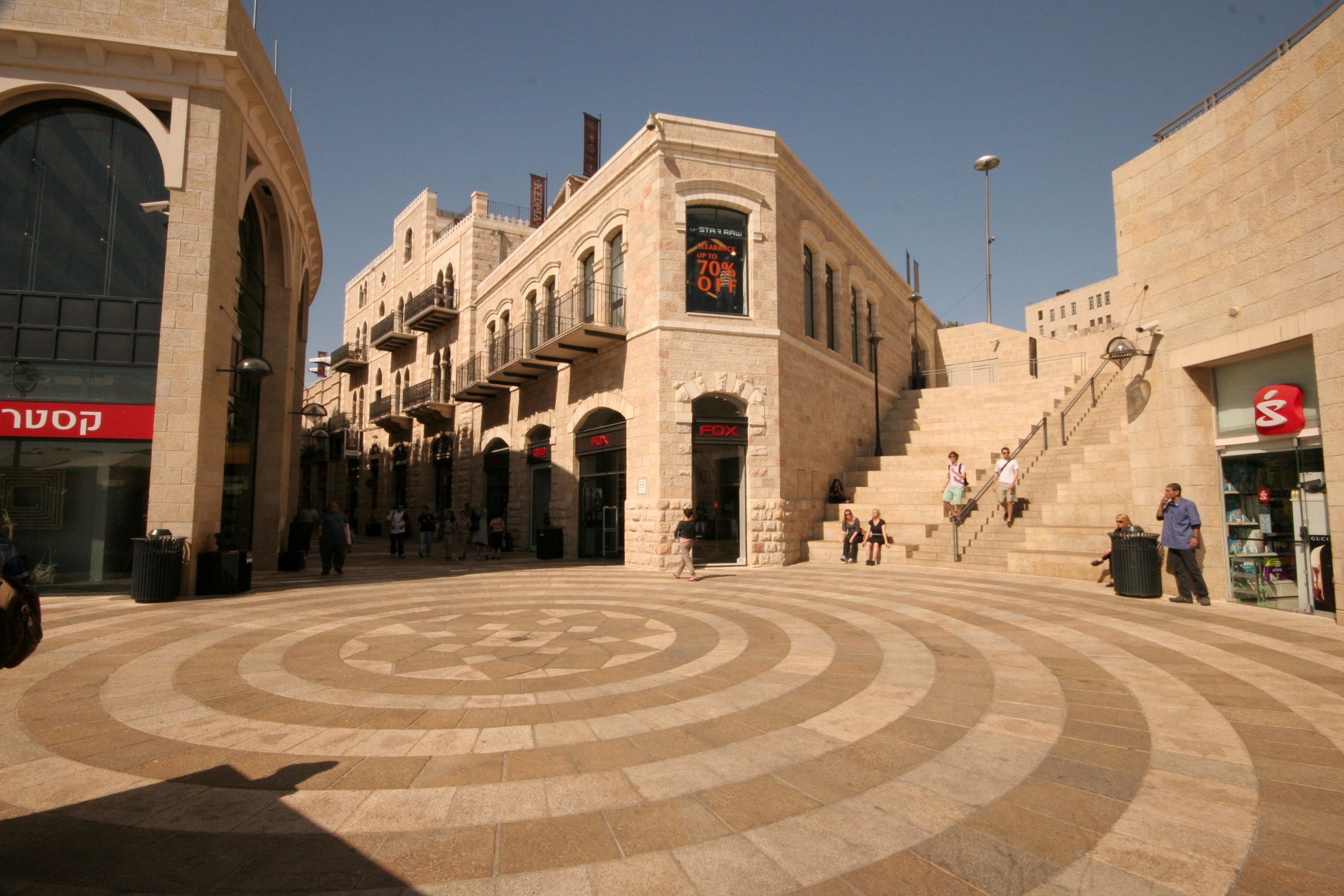 IMG_4748 Jerusalem